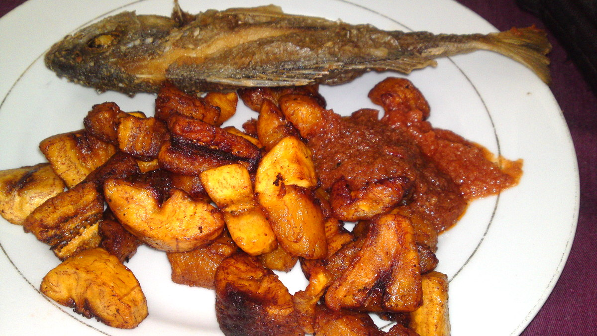 Plat simple d'Alloko au poisson frite abidjanais This is an image of food from Ivory Coast